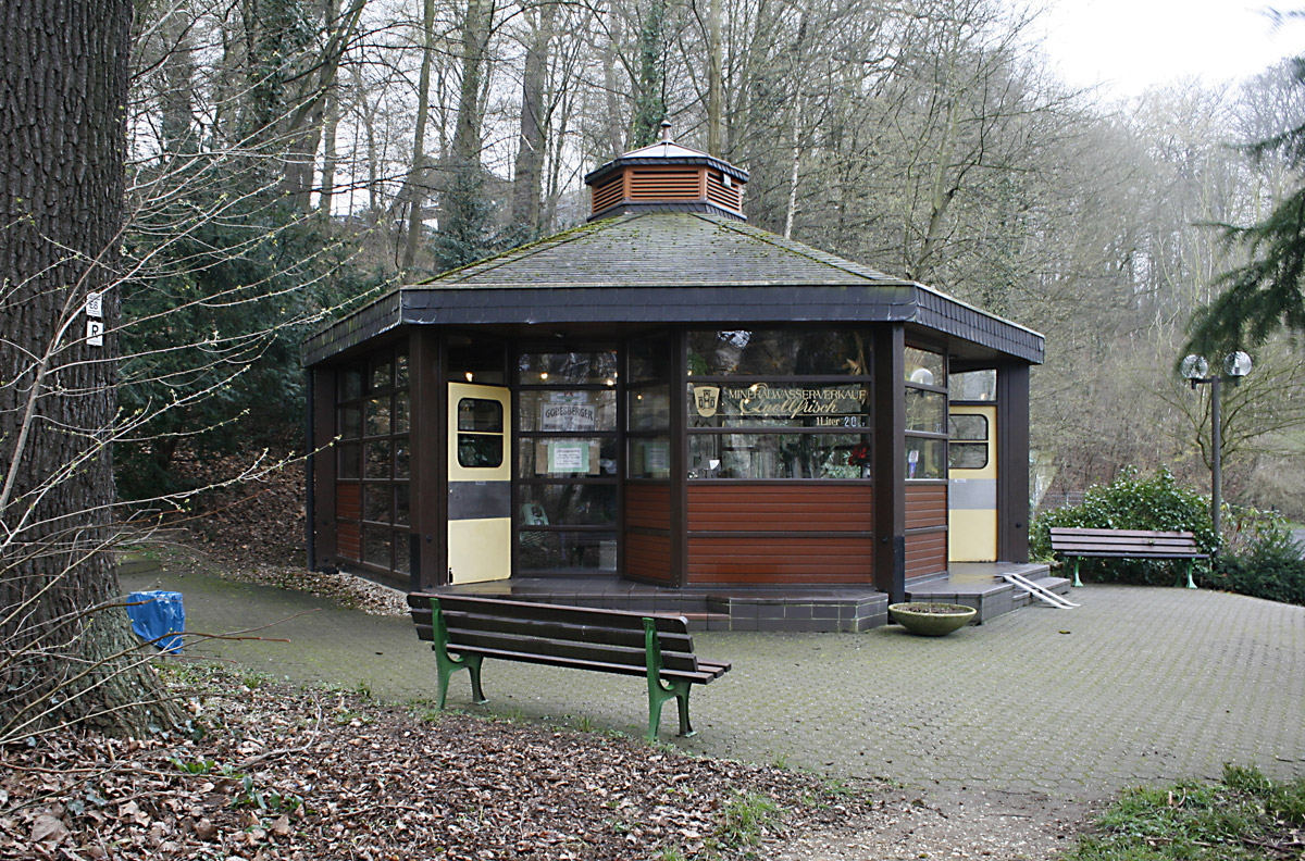 Trinkpavillon für Mineralwasser der Kurfürstenquelle in Bonn-Bad Godesberg